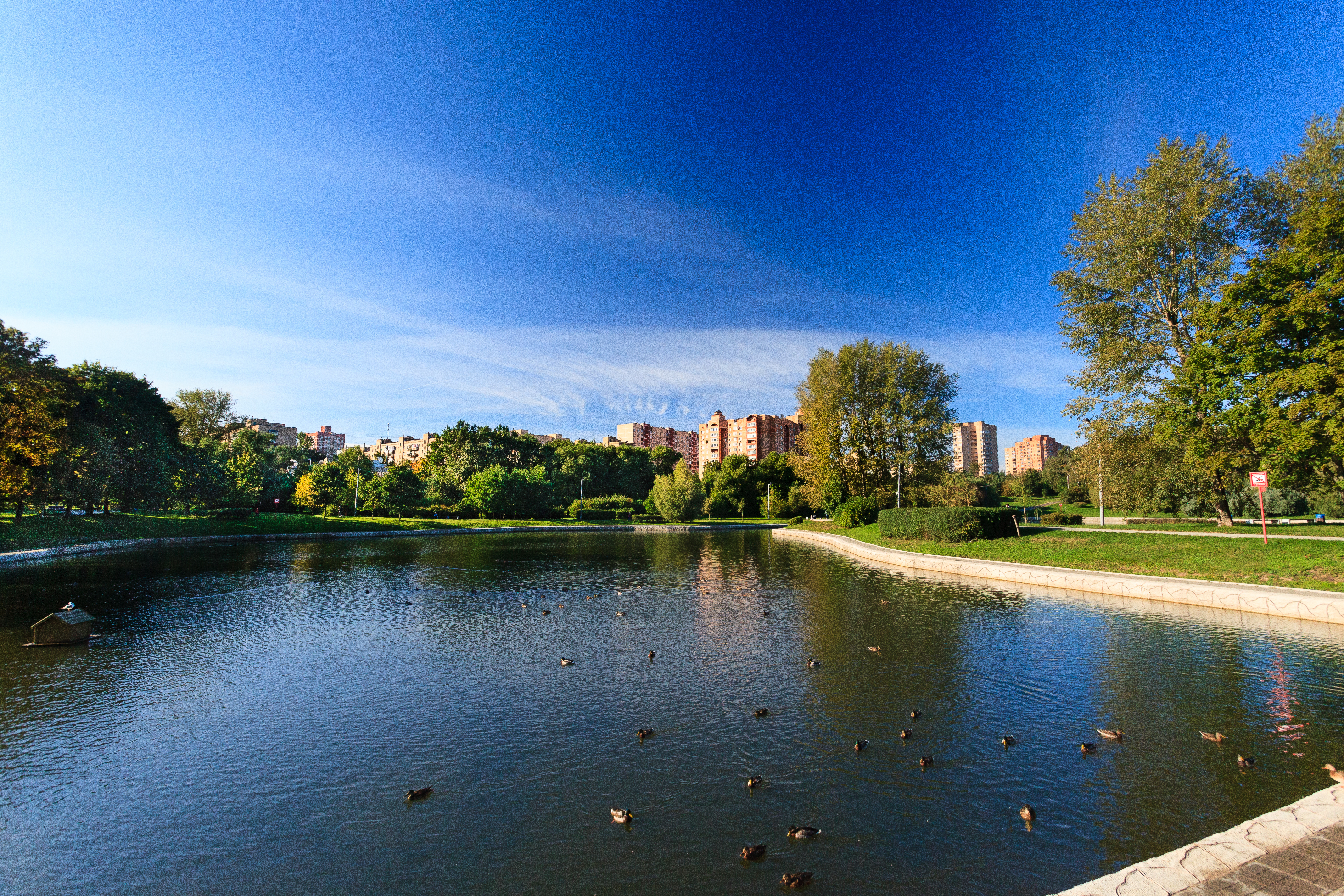 Фестивальные пруды в парке Дружбы, САО Москвы, у станции метро "Речной вокзал". Парк Дружбы был основан в честь VI Всемирного фестиваля молодёжи и студентов 1957 года. Архитекторы - Галина Ежова, Анатолий Савин, Валентин Иванов, руководитель проекта - Виталий Долганов.